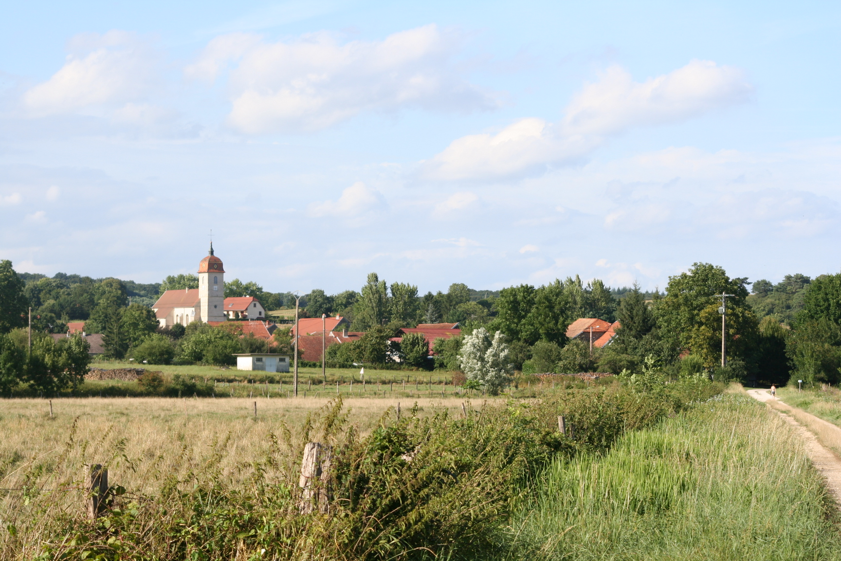 Vue du village depuis le chemin des rives de Saône